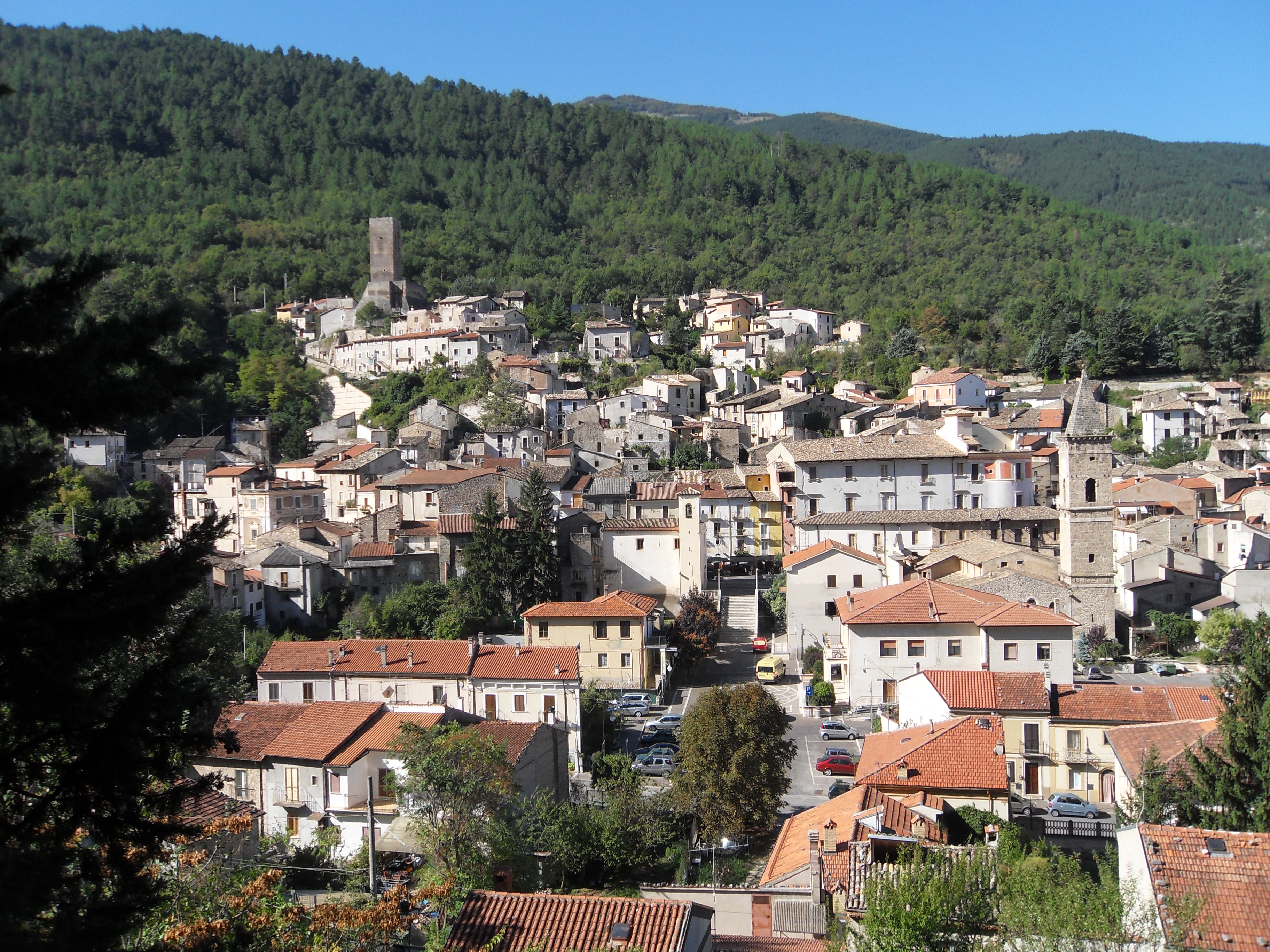 Introdacqua, L'Aquila Abruzzo